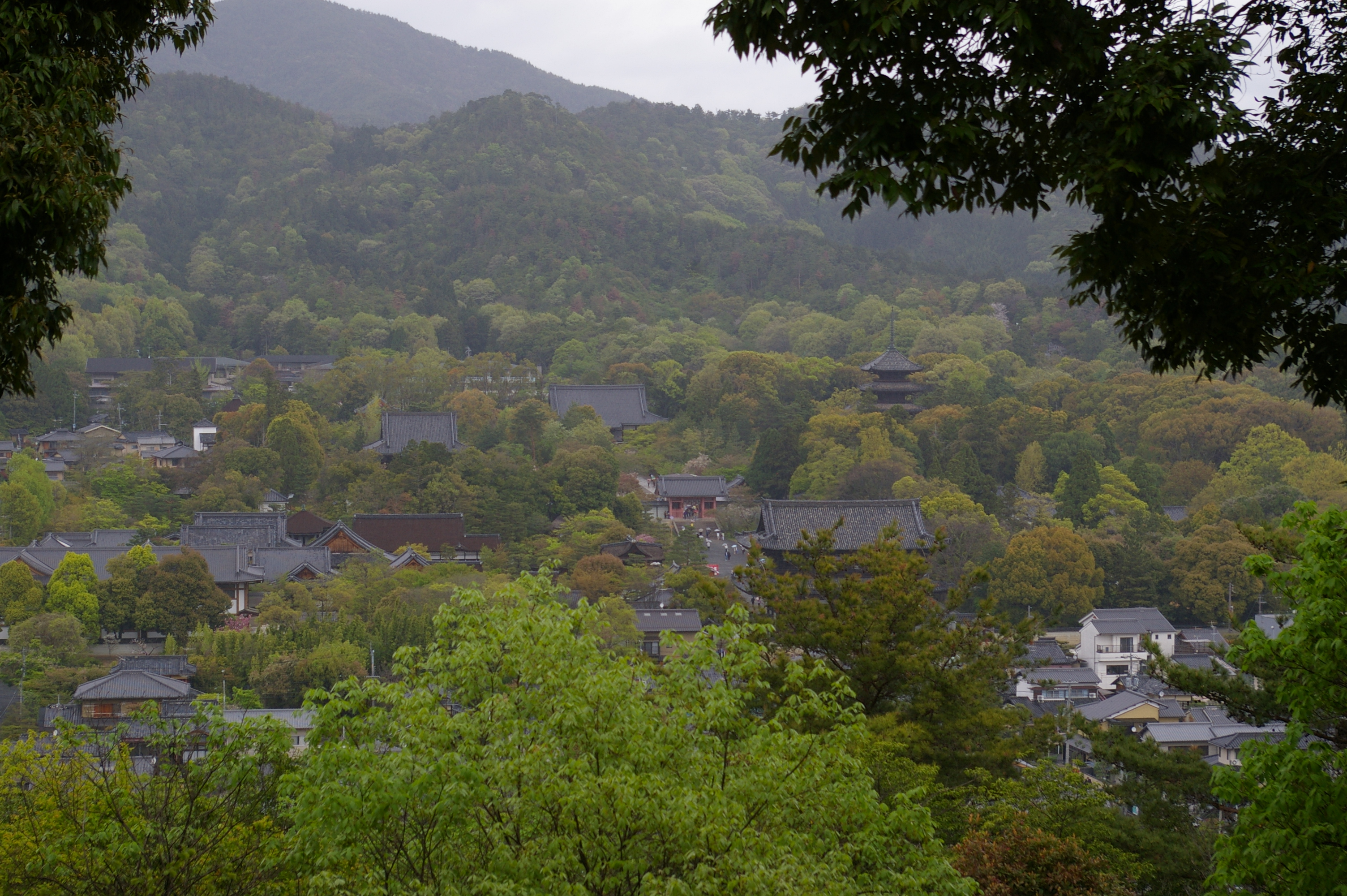 Ninnaji-temple_from_Narabigaoka